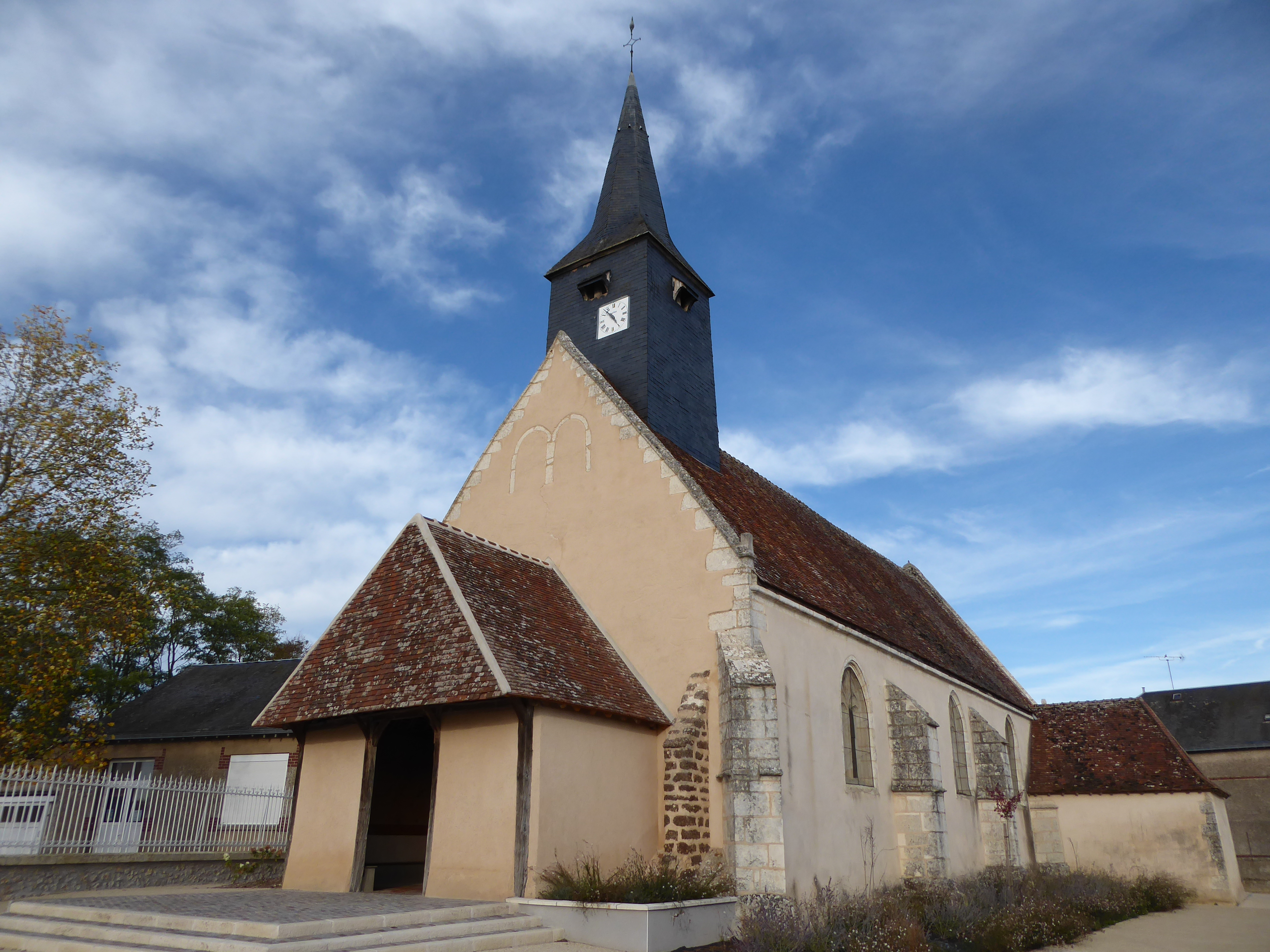 église Saint-Martin de Logron, Eure-et-Loir, France.